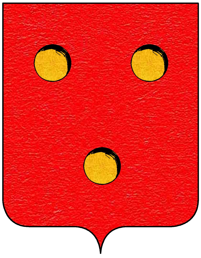 Stemma della famiglia Lucchesi Palli